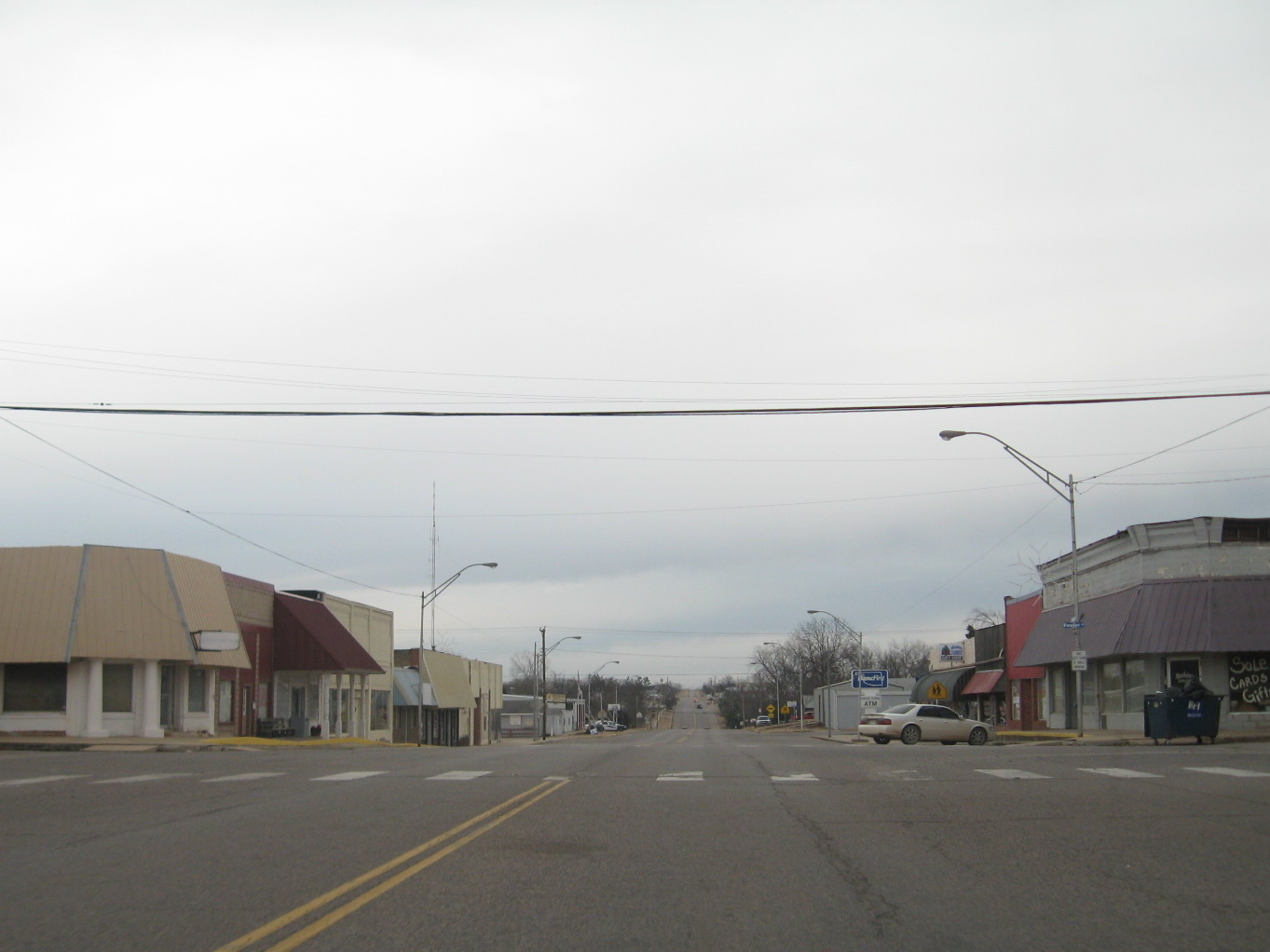 U.S. Route 62 in Meeker, Oklahoma.